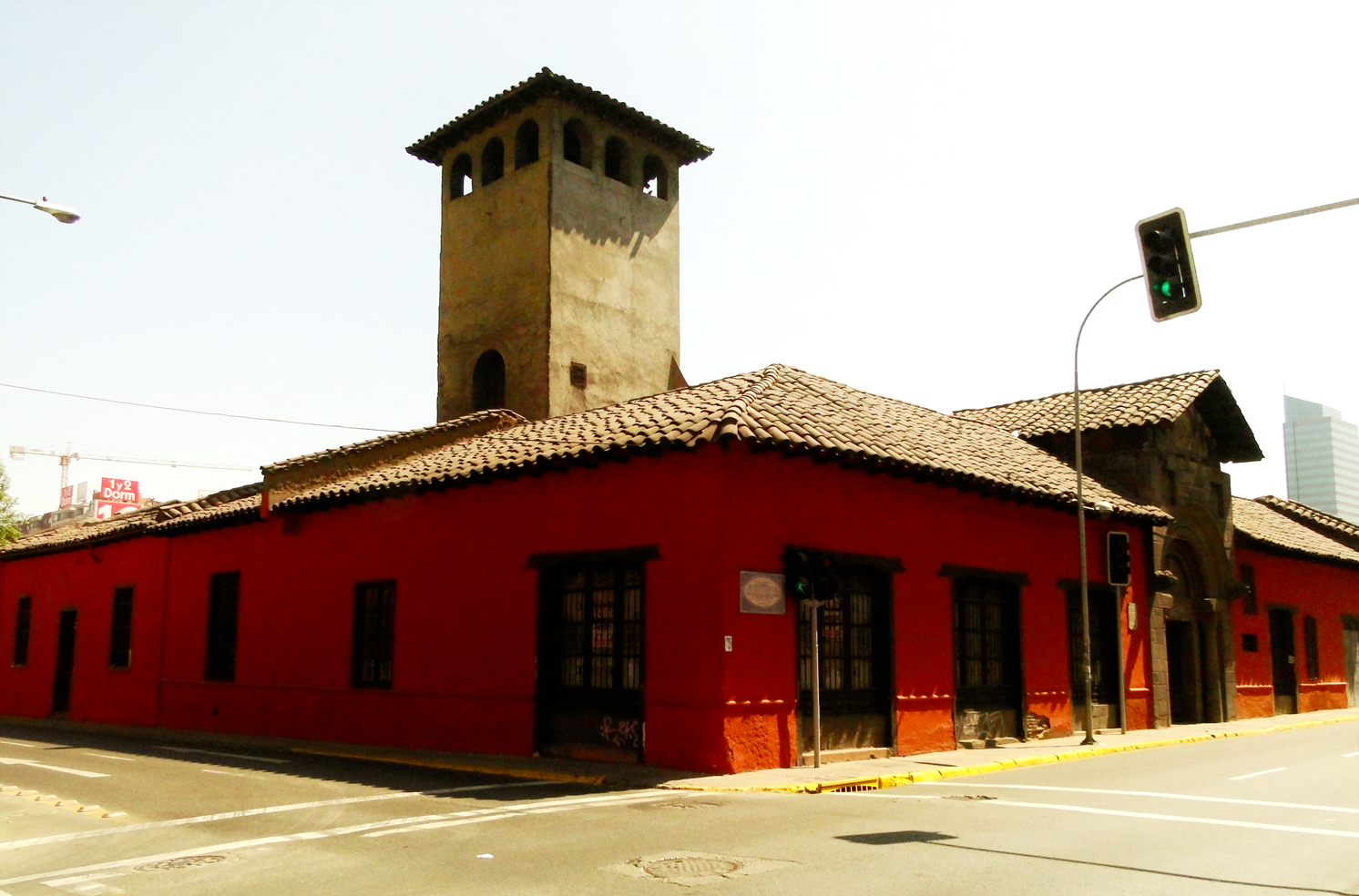 Casa de Los Diez This is a photo of a national monument in Chile: 902